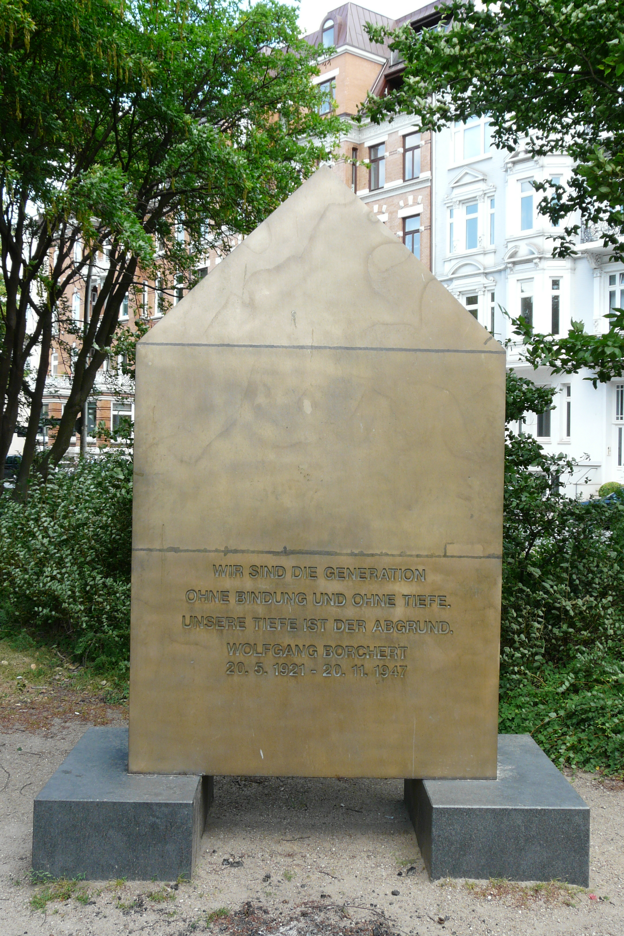 Gedenkstein für Wolfgang Borchert an der Außenalster in Hamburg-Uhlenhorst (eingeweiht 1996)